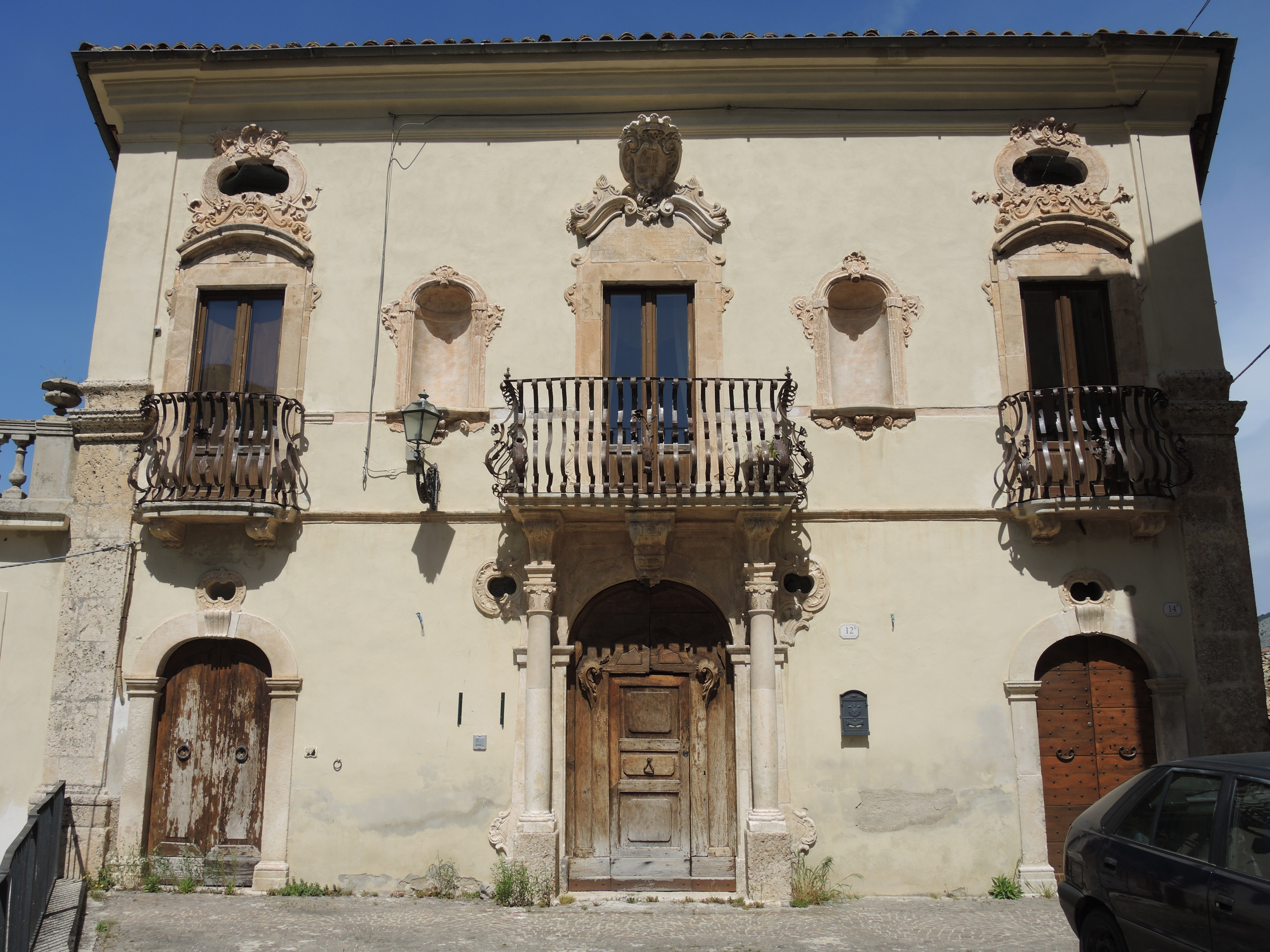 Pettorano sul Gizio